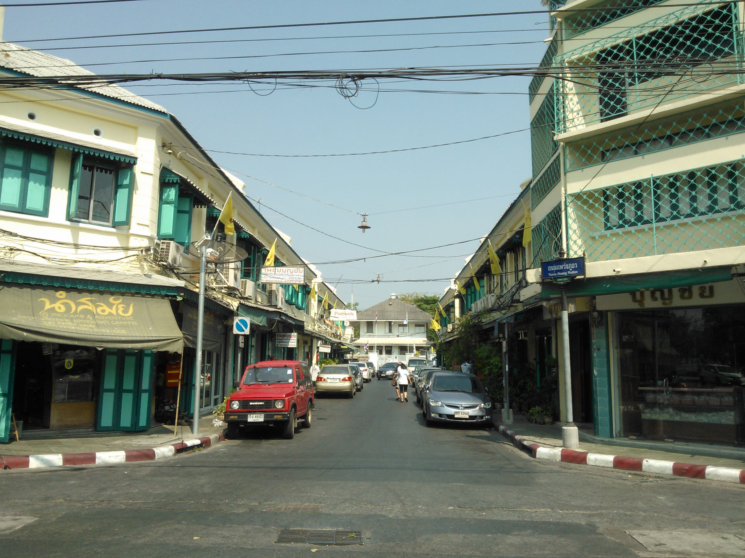 PHRAENG PHUTHON